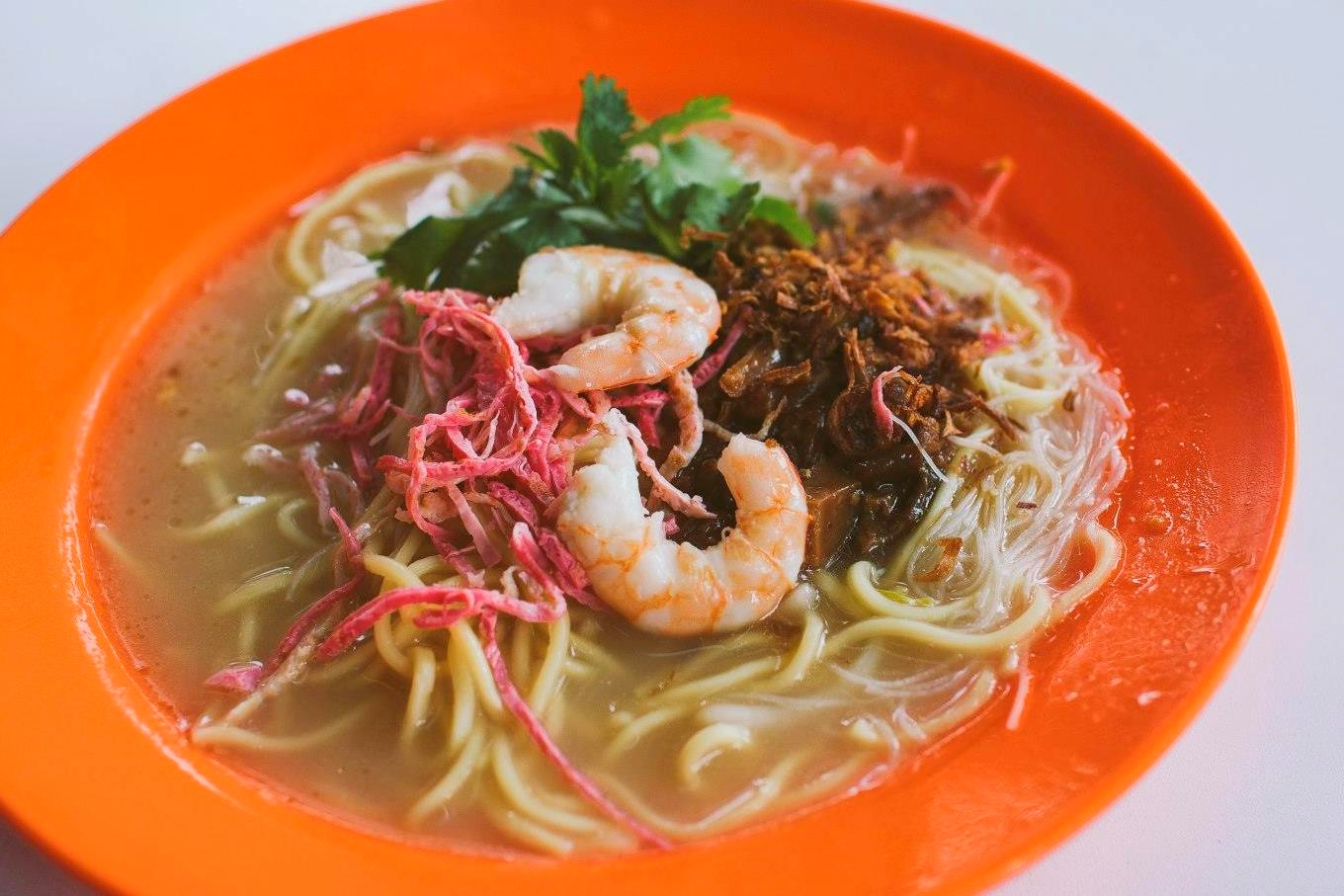 penang lam mee